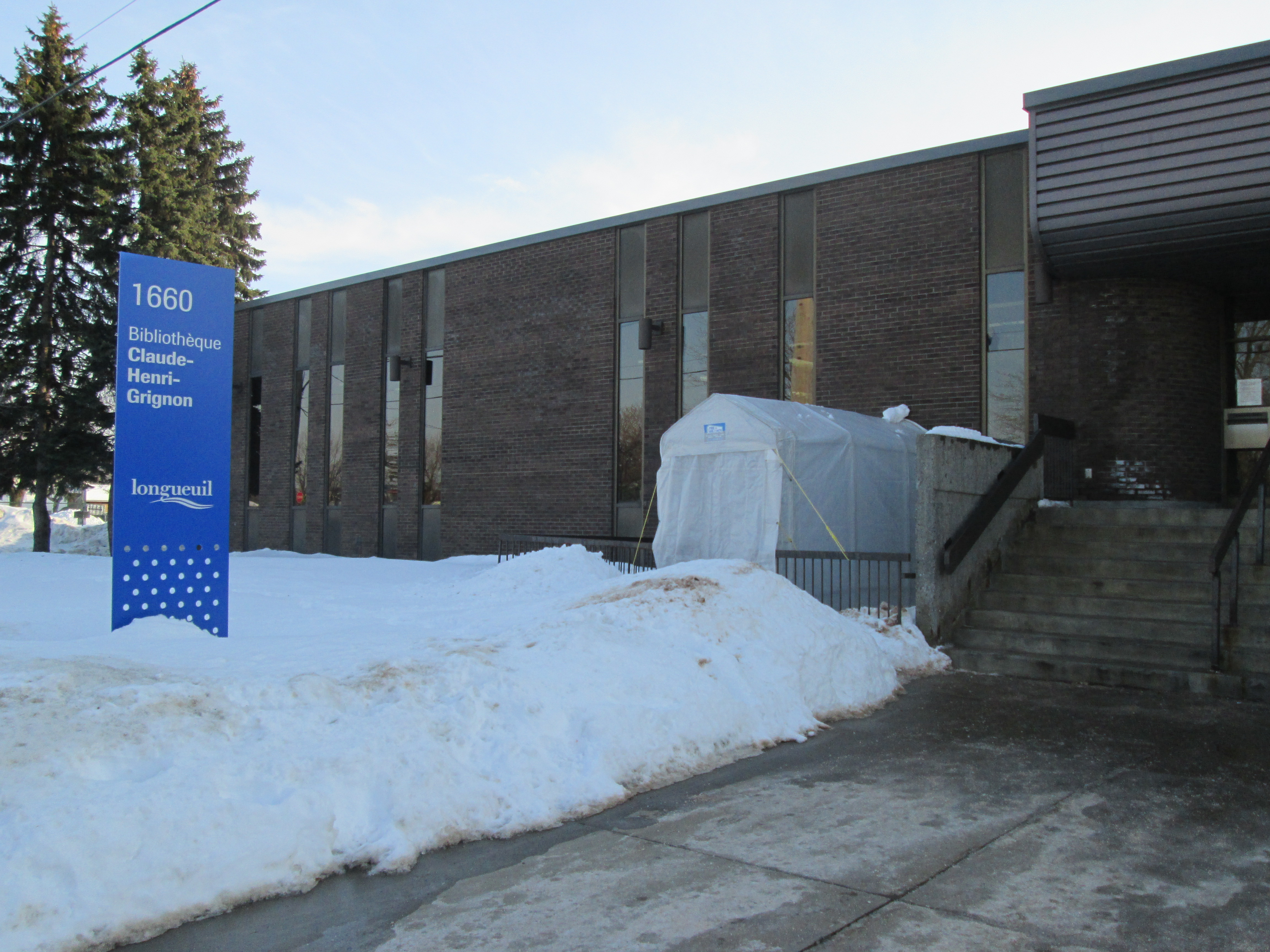 Vue de la Bibliothèque Claude-Henri-Grignon, faisant partie du réseau des bibliothèques de Longueuil (Québec, Canada)